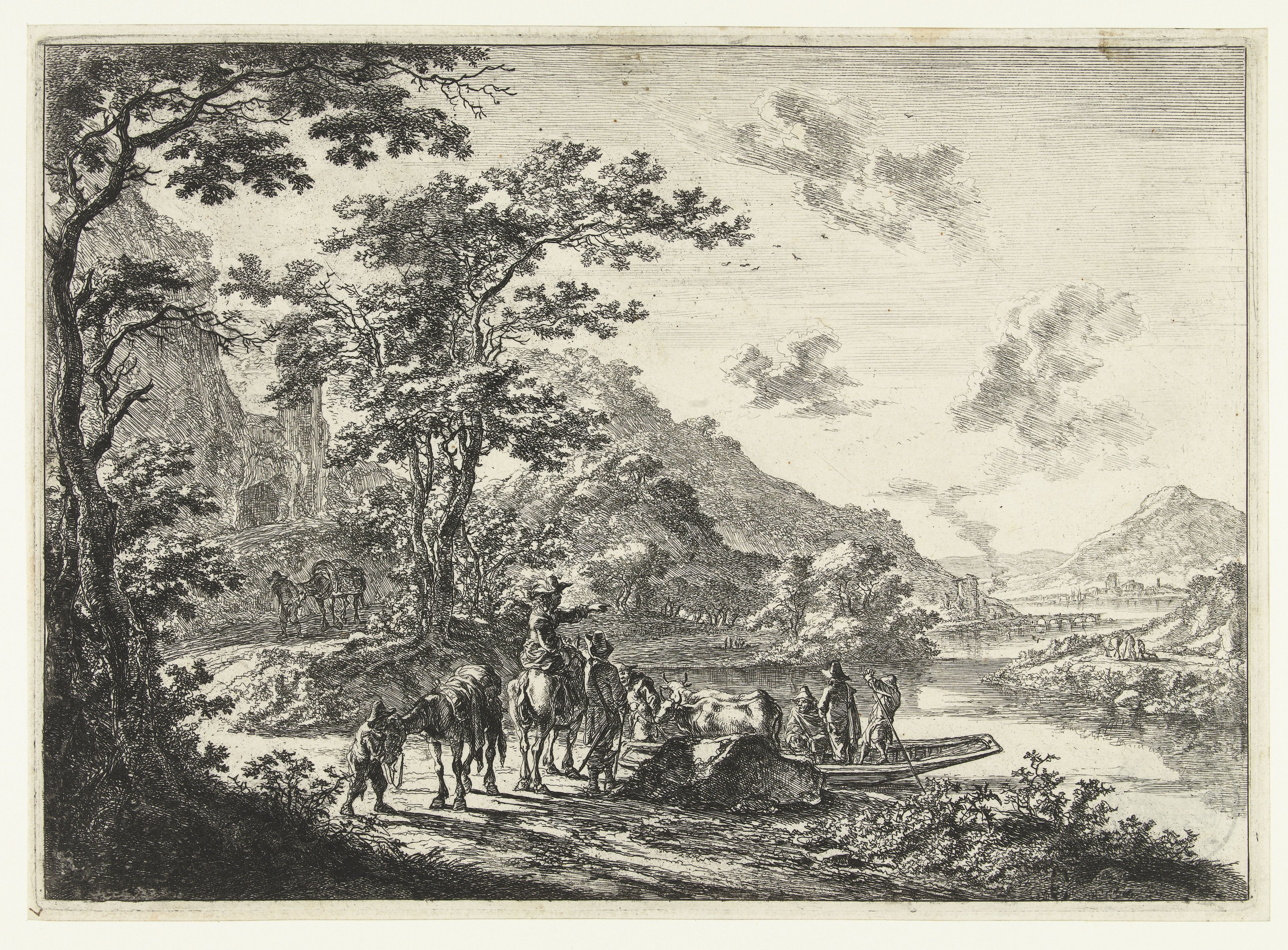 IdentificatieTitel(s): Landschap met veerpont en wachtende reizigers aan oever van de TiberLandschappen in de omgeving van Rome (serietitel)Objecttype: prent Objectnummer: RP-P-H-R-62Catalogusreferentie: Bartsch 7Hollstein Dutch 7-3(7)Opschriften / Merken: nummer, recto linksonder, handgeschreven: ‘7’verzamelaarsmerk, verso linksonder, gestempeld: Lugt 10VervaardigingVervaardiger: prentmaker: Jan Bothnaar eigen ontwerp van: Jan BothPlaats vervaardiging: UtrechtDatering: 1644 - 1652Fysieke kenmerken: etsMateriaal: papier Techniek: etsenAfmetingen: plaatrand: h 198 mm × b 275 mmOnderwerpWat: landscapes with waters, waterscapes, seascapes (in the temperate zone)Waar: TiberVerwerving en rechtenCredit line: Bruikleen van de Rijksakademie van Beeldende KunstenVerwerving: bruikleen 1957Copyright: Publiek domein